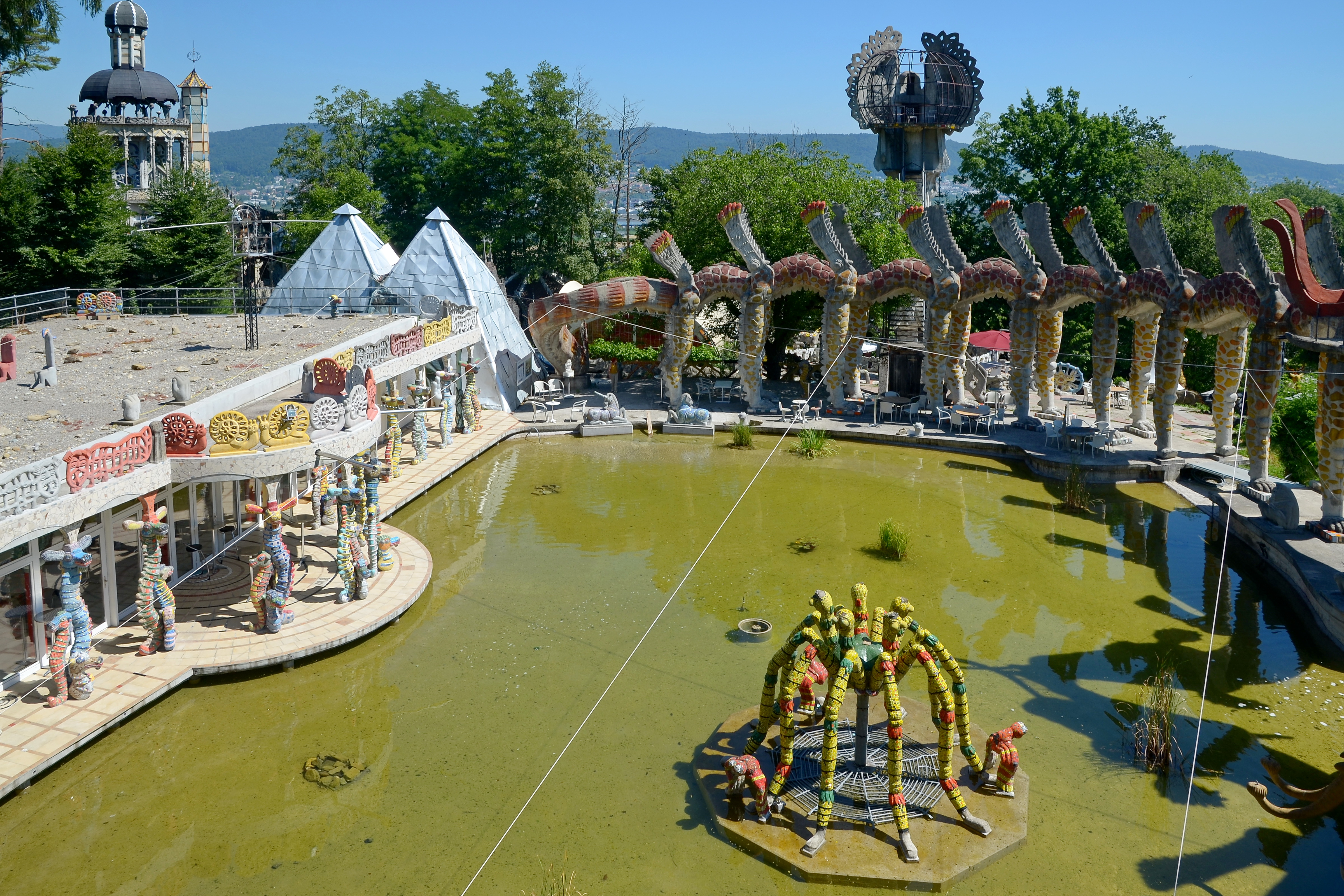 Bruno Weber Skulpturenpark in Dietikon - Spreitenbach (Switzerland)